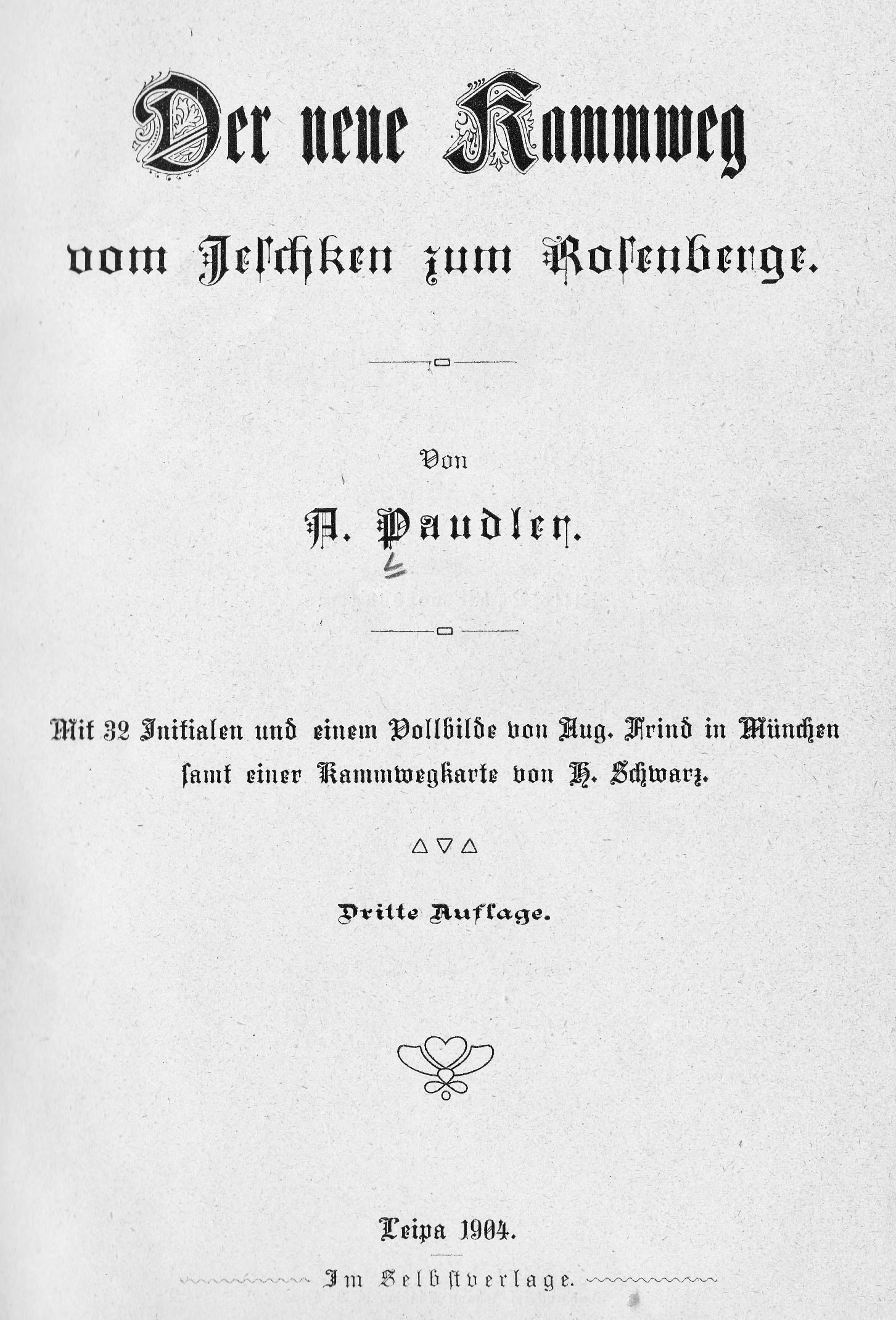 Titelseite des Buches von Anton Amand Paudler: Der neue Kammweg vom Jeschken zum Rosenberge, (Böhmisch) Leipa, 1904, 251 S.